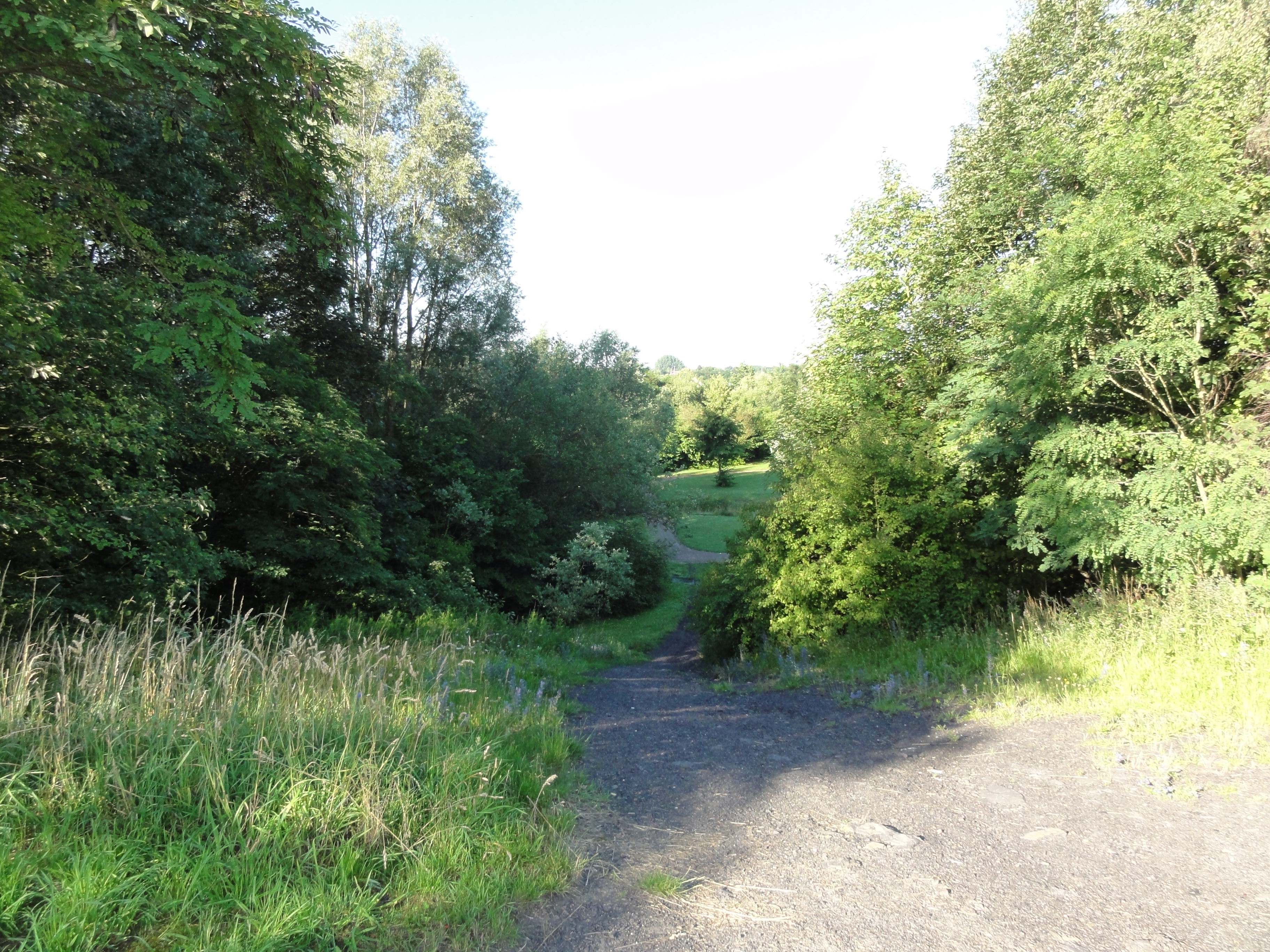 Terril n° 130 dit Pas de la Ville Est, Fosse n° 6 de la Compagnie des mines de l'Escarpelle, Leforest, Pas-de-Calais, Nord-Pas-de-Calais, France.